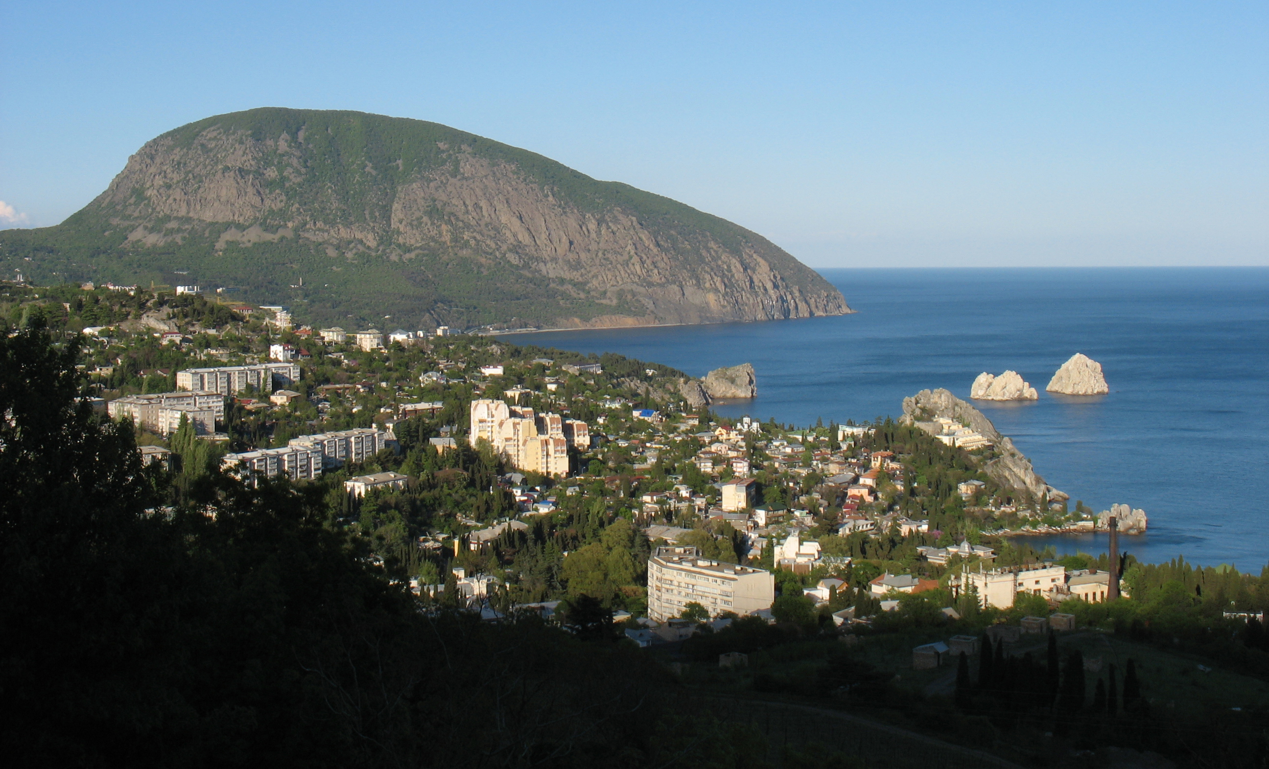 Аю-Даг, Запрудниньське л-во, кв.32 сел. Партеніт